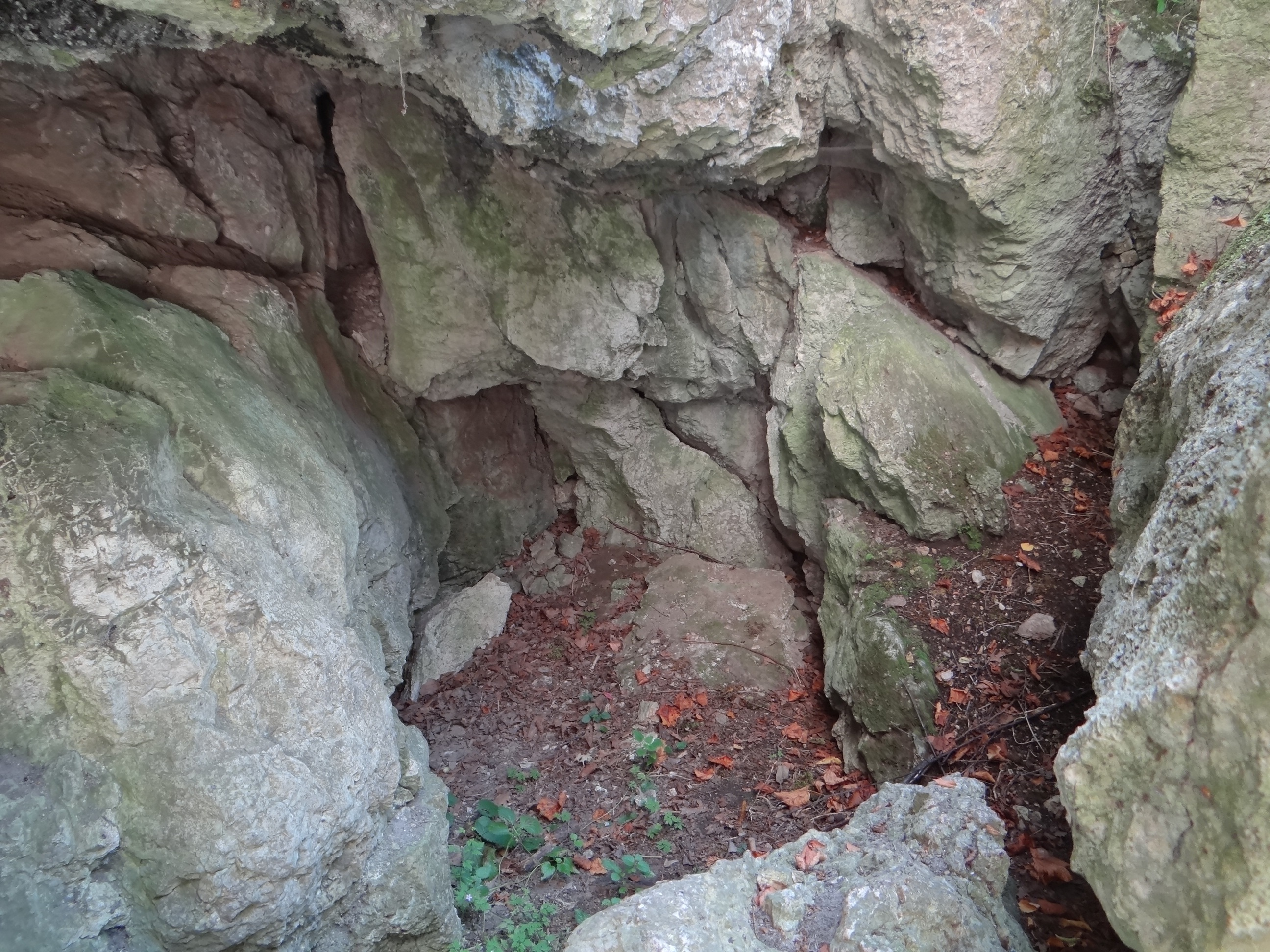 Jaskinia na Wrzosach Południowa